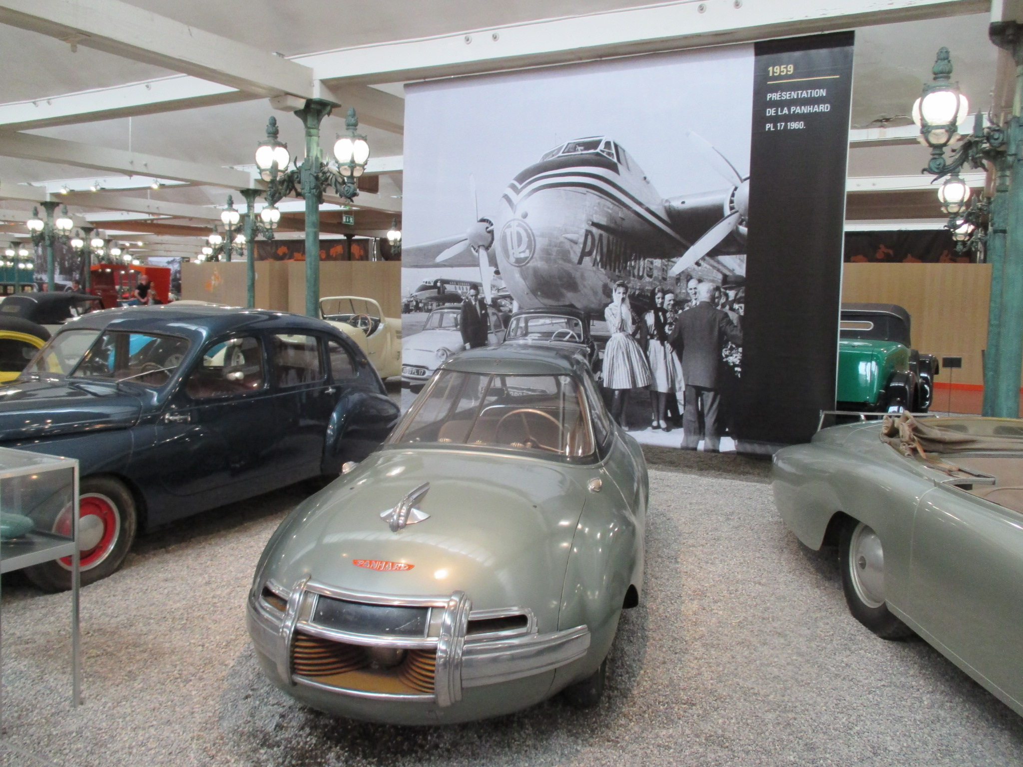 Panhard Dynavia 1948 - cité de l'automobile de Mulhouse